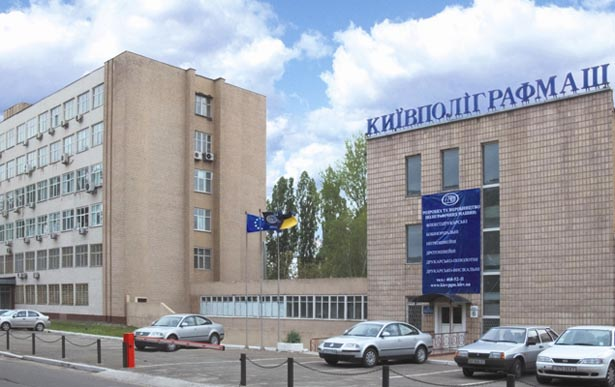 Київполіграфмаш